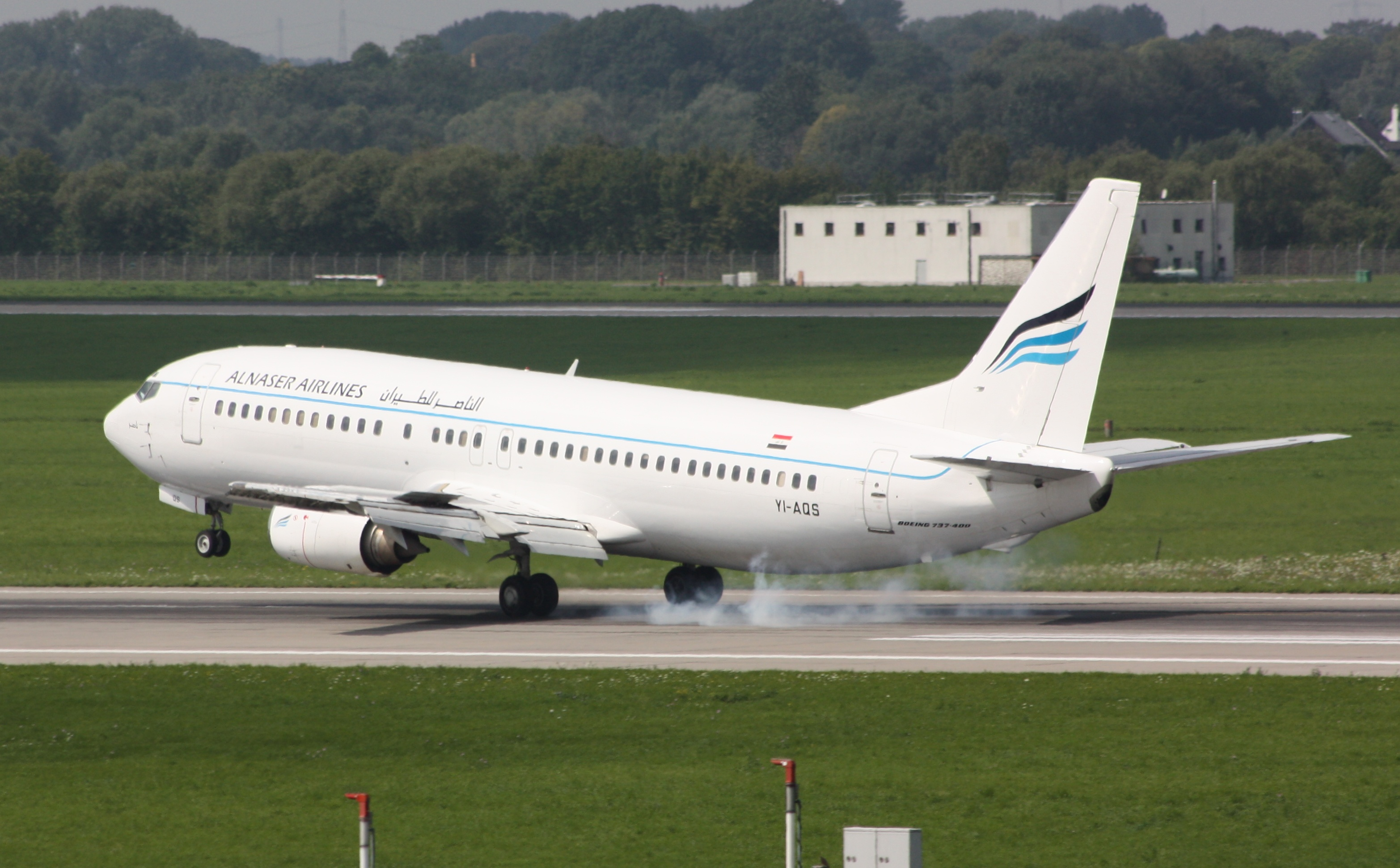 YI-AQS, AlNaser Airlines B734 (Boeing 737-48E), c/n 25765